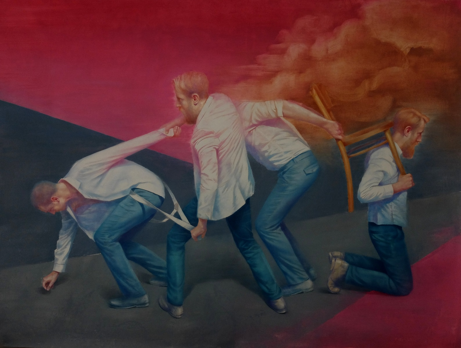 Sylwester Stabryła, Ziemia Niczyja, olej na płótnie, 165x225cm, 2018r